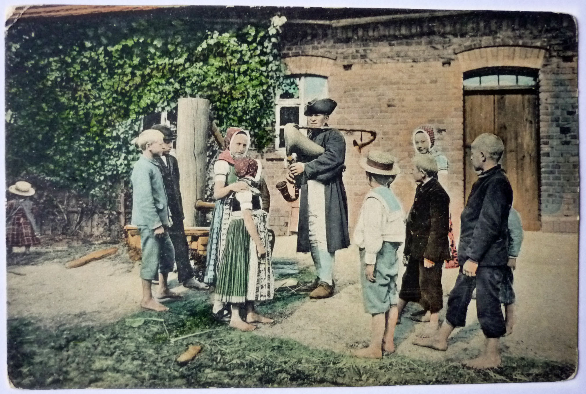 Schleife - Dudelsackspieler Pohla (alte Postkarte von 1907)